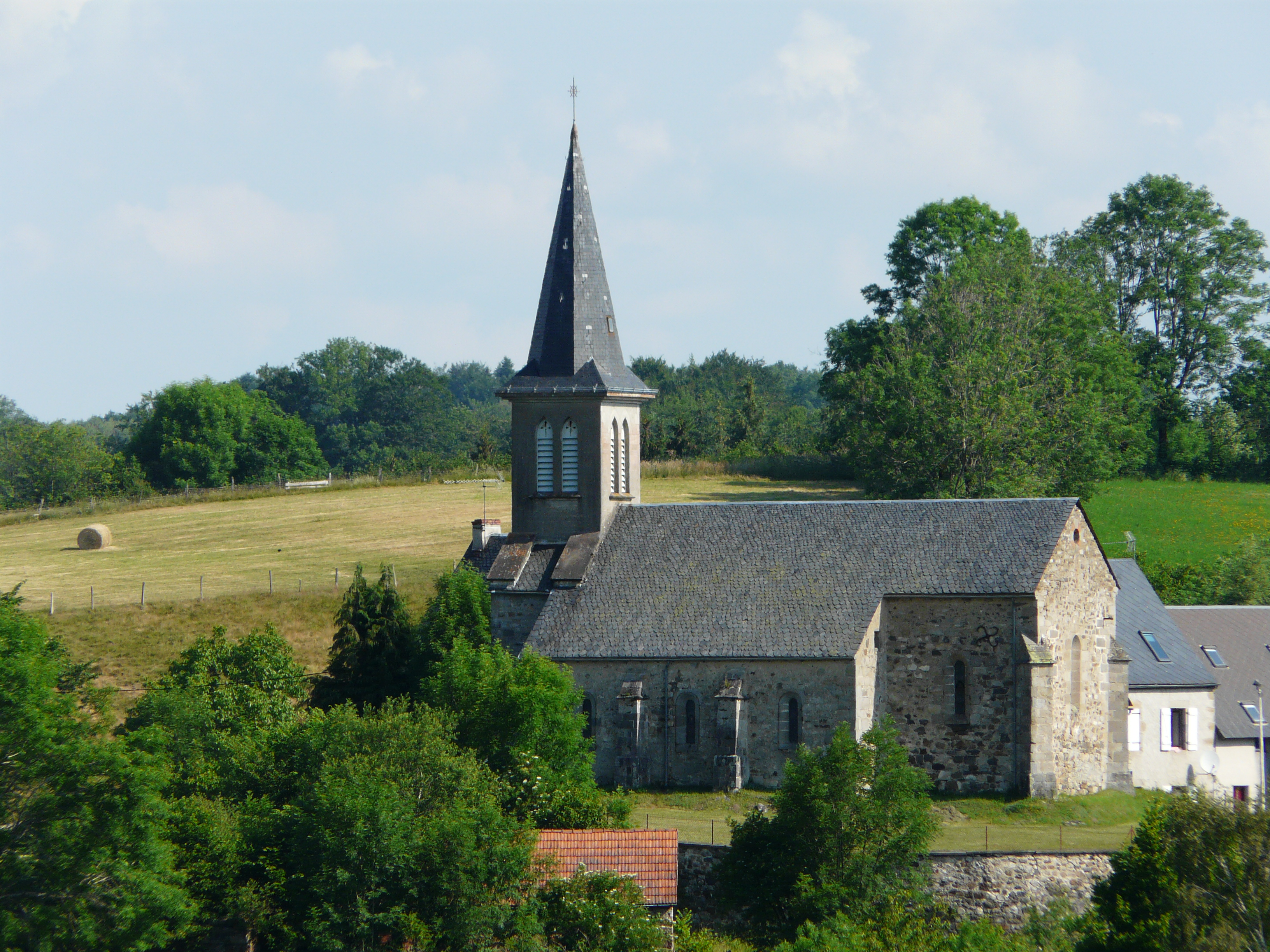 L'église Saint-Loup, Trémouille-Saint-Loup, Puy-de-Dôme, France.